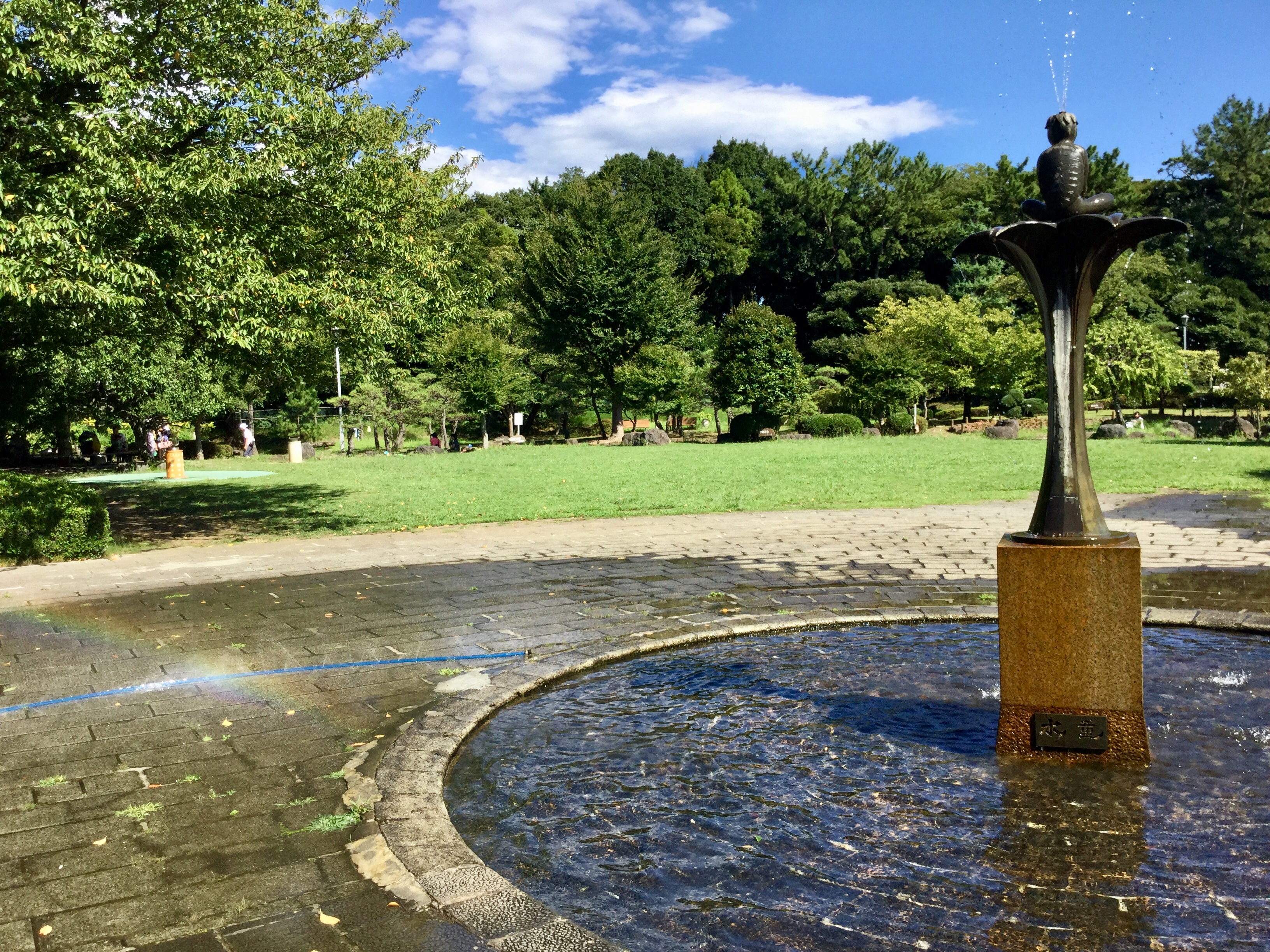 神奈川県にある水道記念館。